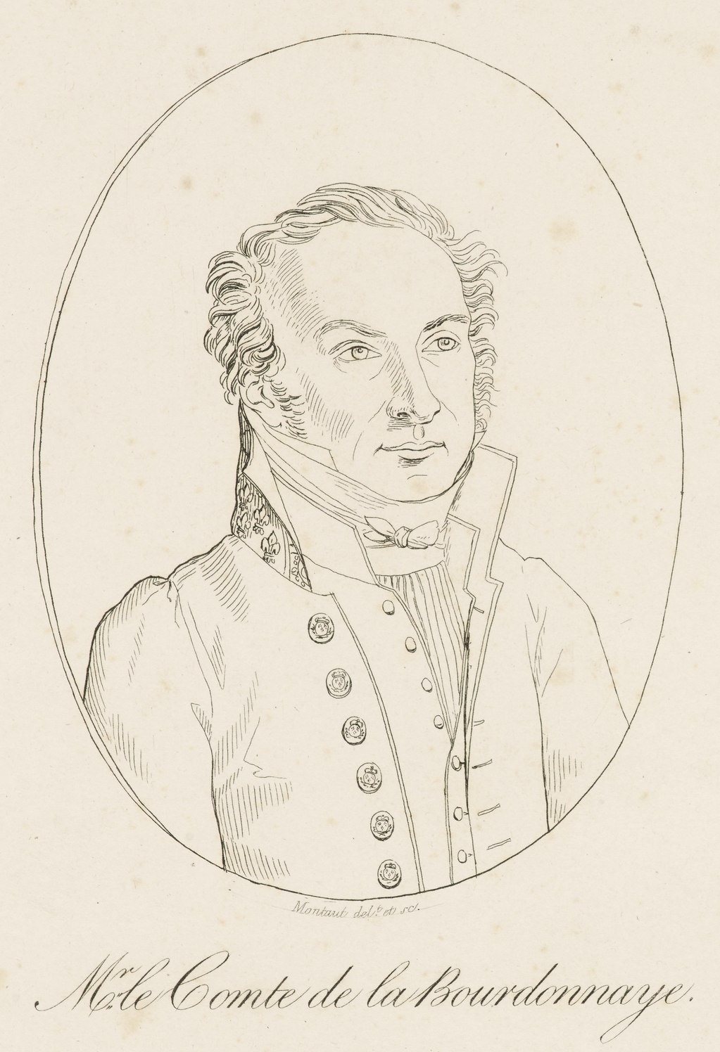 Portrait de François-Régis de la Bourdonnaye